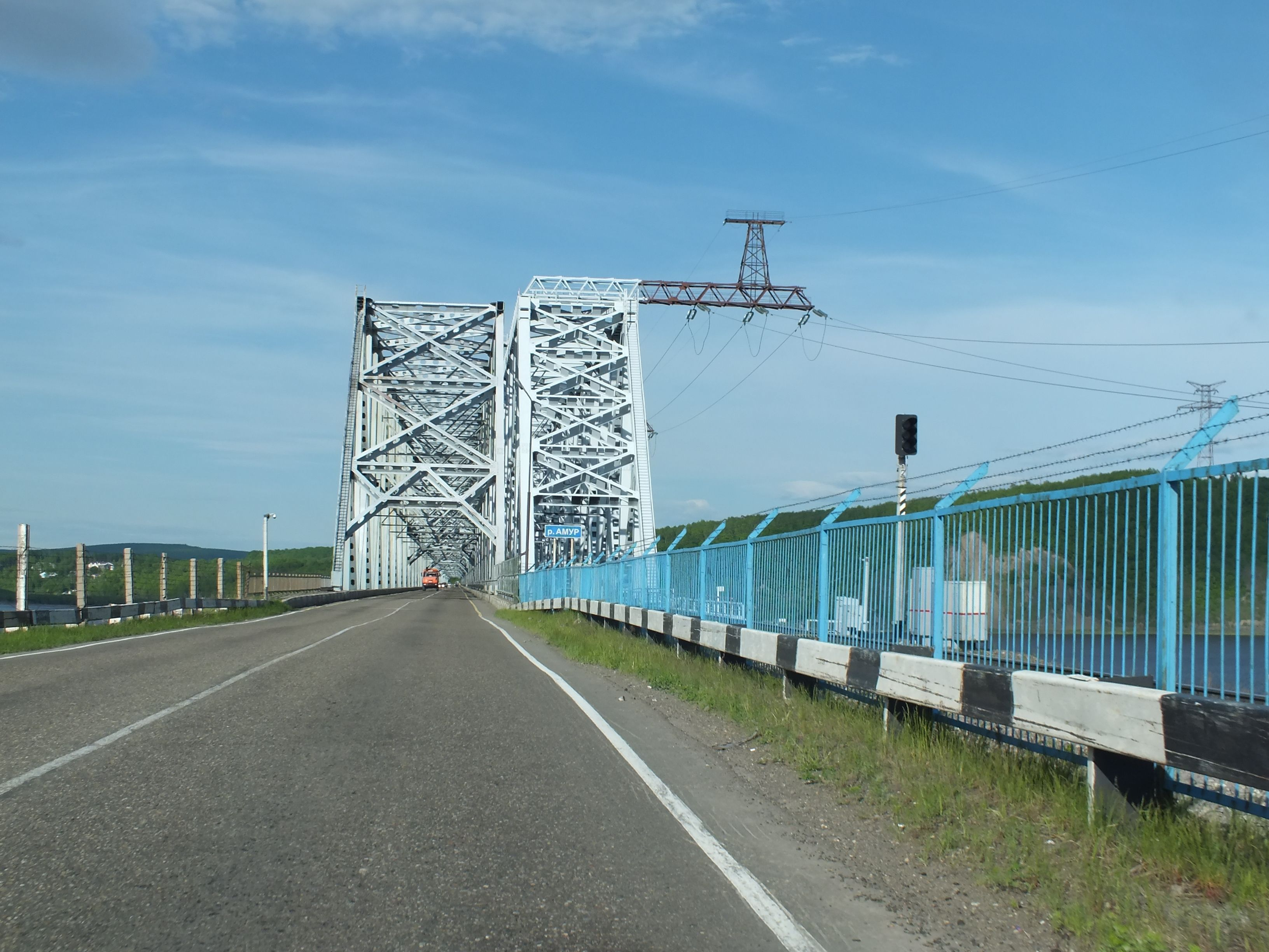 Road-rail bridge over Amur River near Komsomolsk-on-Amur